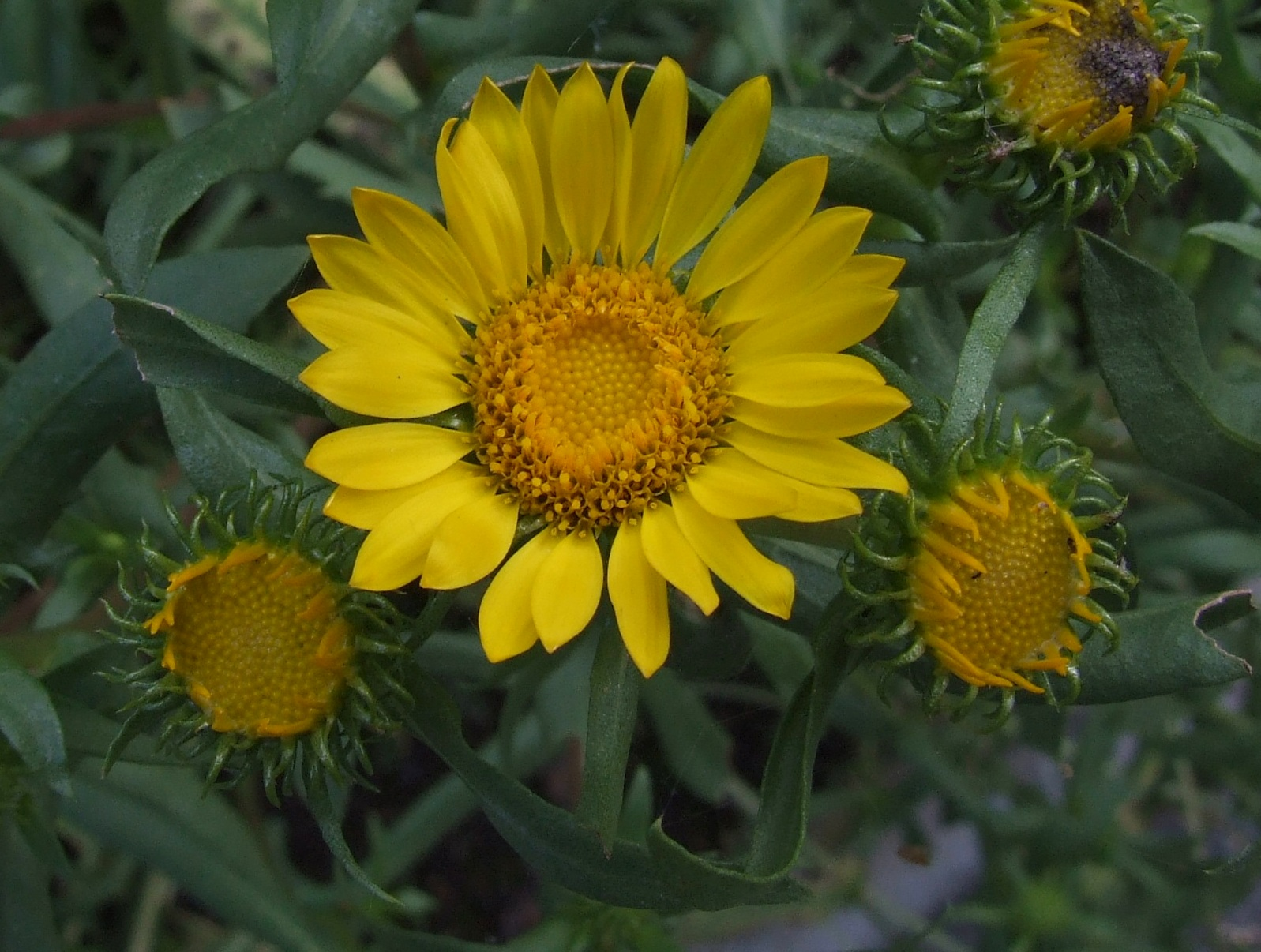 Grindelia camporum (pl. doględka wielka)